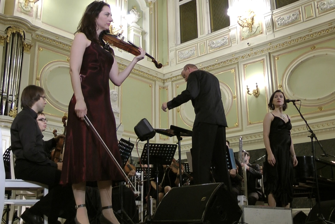 Первое исполнение сочинения Луи Андриссена La passion в Санкт-Петербурге. Моника Жермино (скрипка), Михаэла Ринер (сопрано), Московский Ансамбль Современной Музыки, дирижирует Юрьен Хемпел